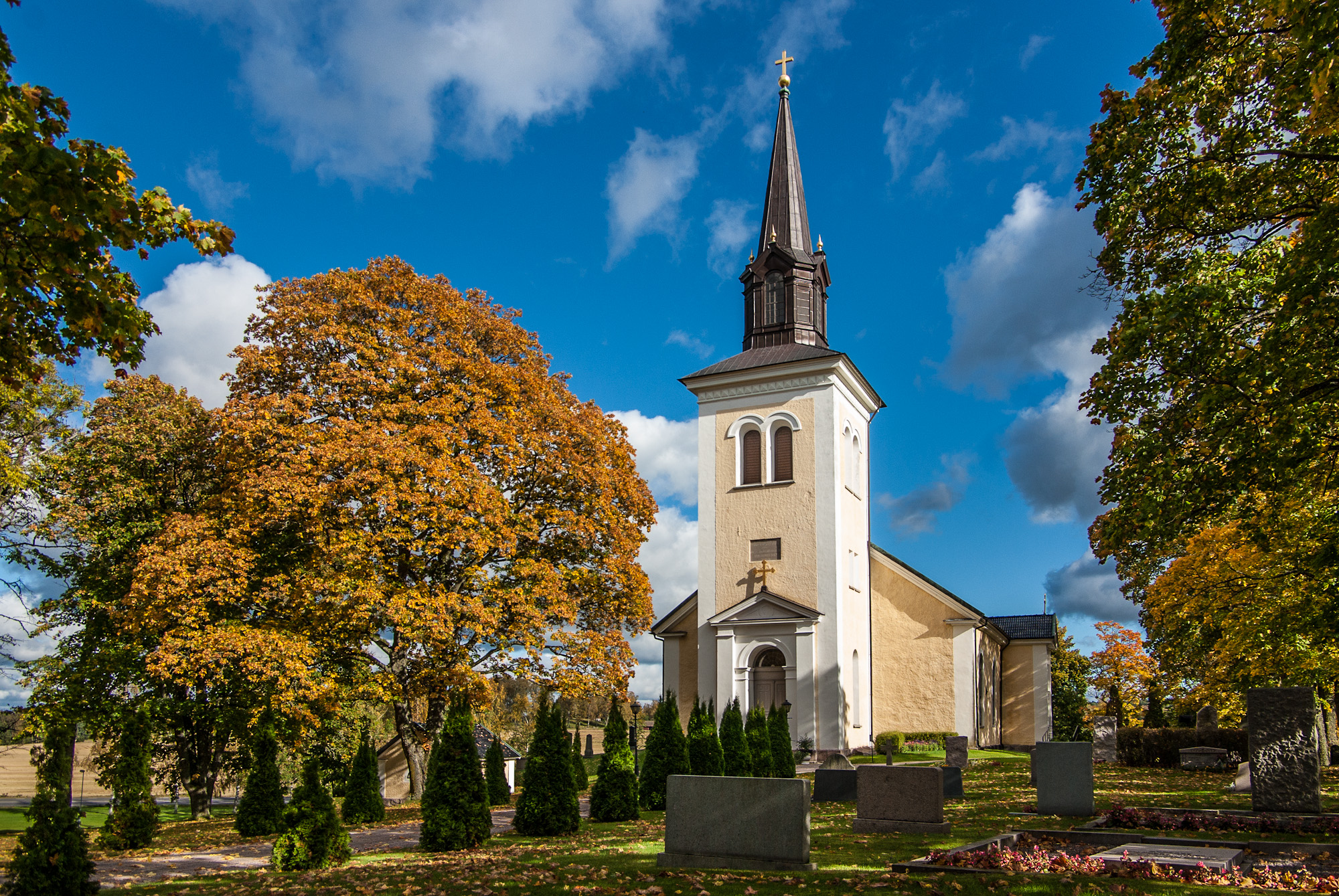 Kyrkefalla kyrka (Tibro kyrka) i Tibro kummun tillhörande Skara stift.